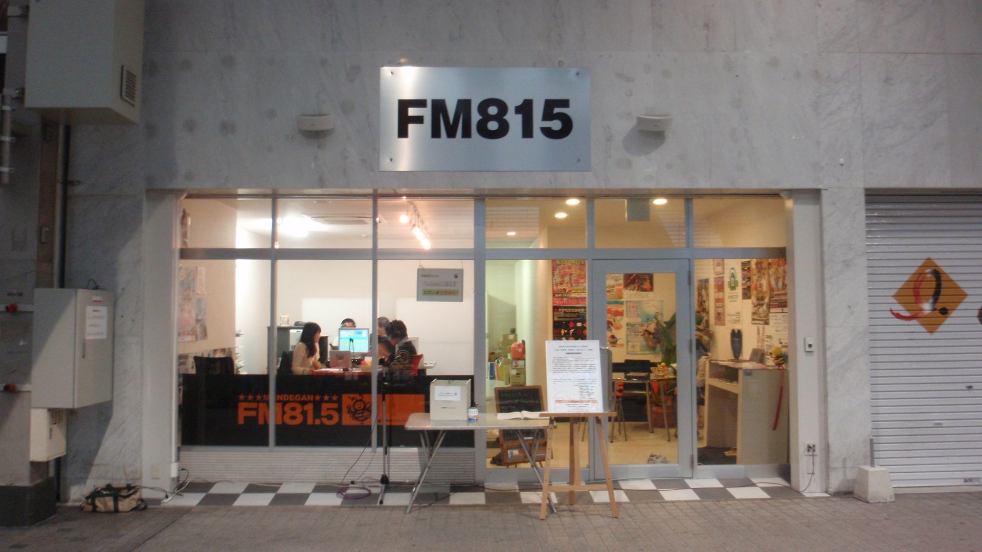 香川県高松市常磐町一丁目にあるエフエム高松コミュニティ放送（FM高松）の本社兼オープンスタジオ。